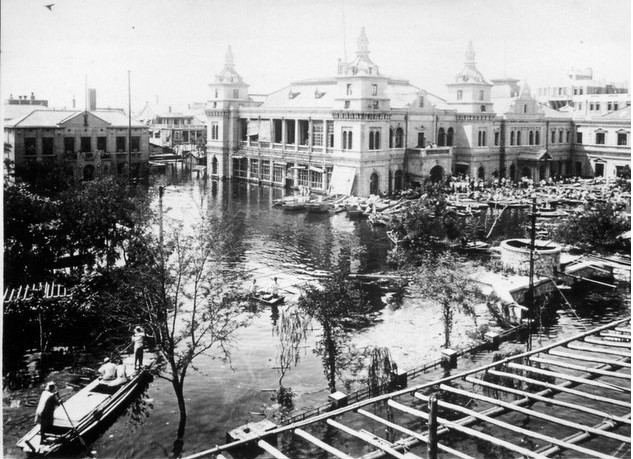 中文（中国大陆）: 1939年大水中的天津日本公会堂